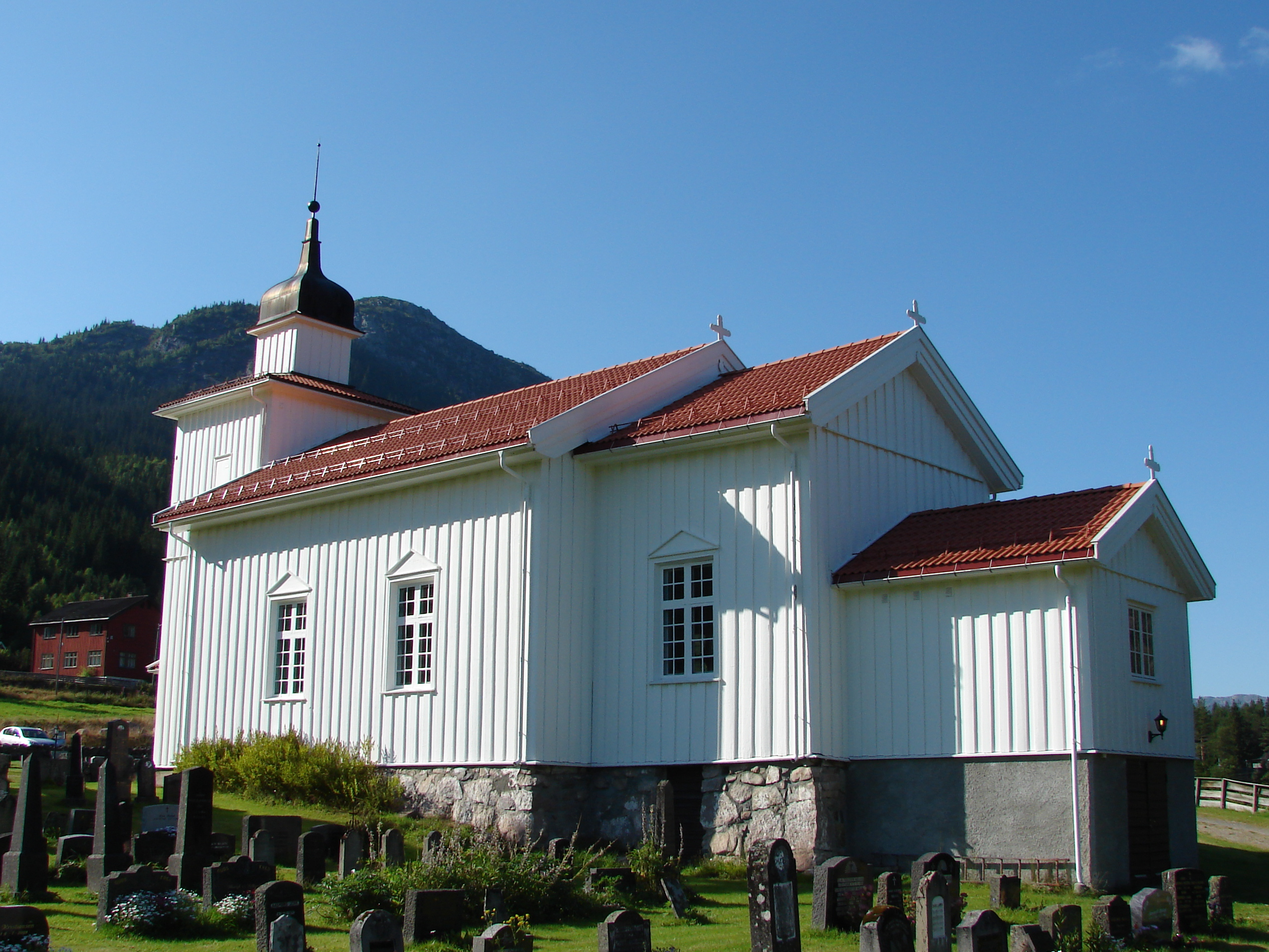 Mo kirke i Telemark